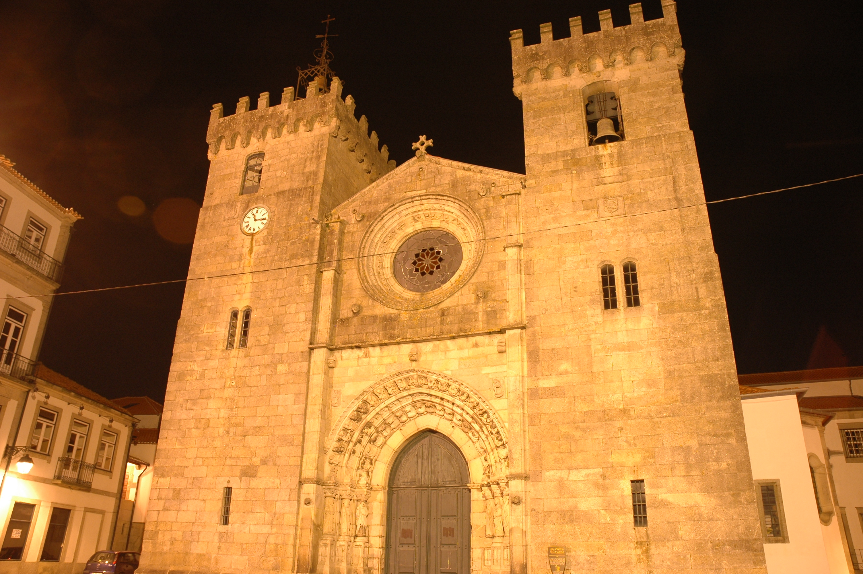 Església major de Viana do Castelo - Façana